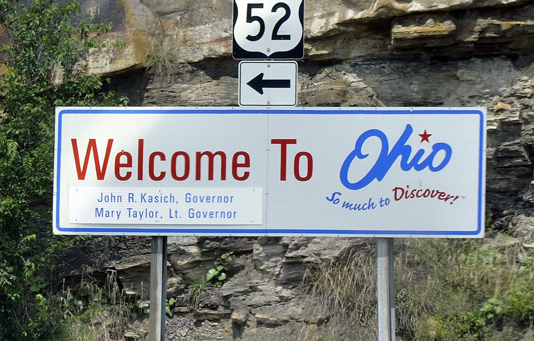 Ohio, Grenzschild bei Ashland